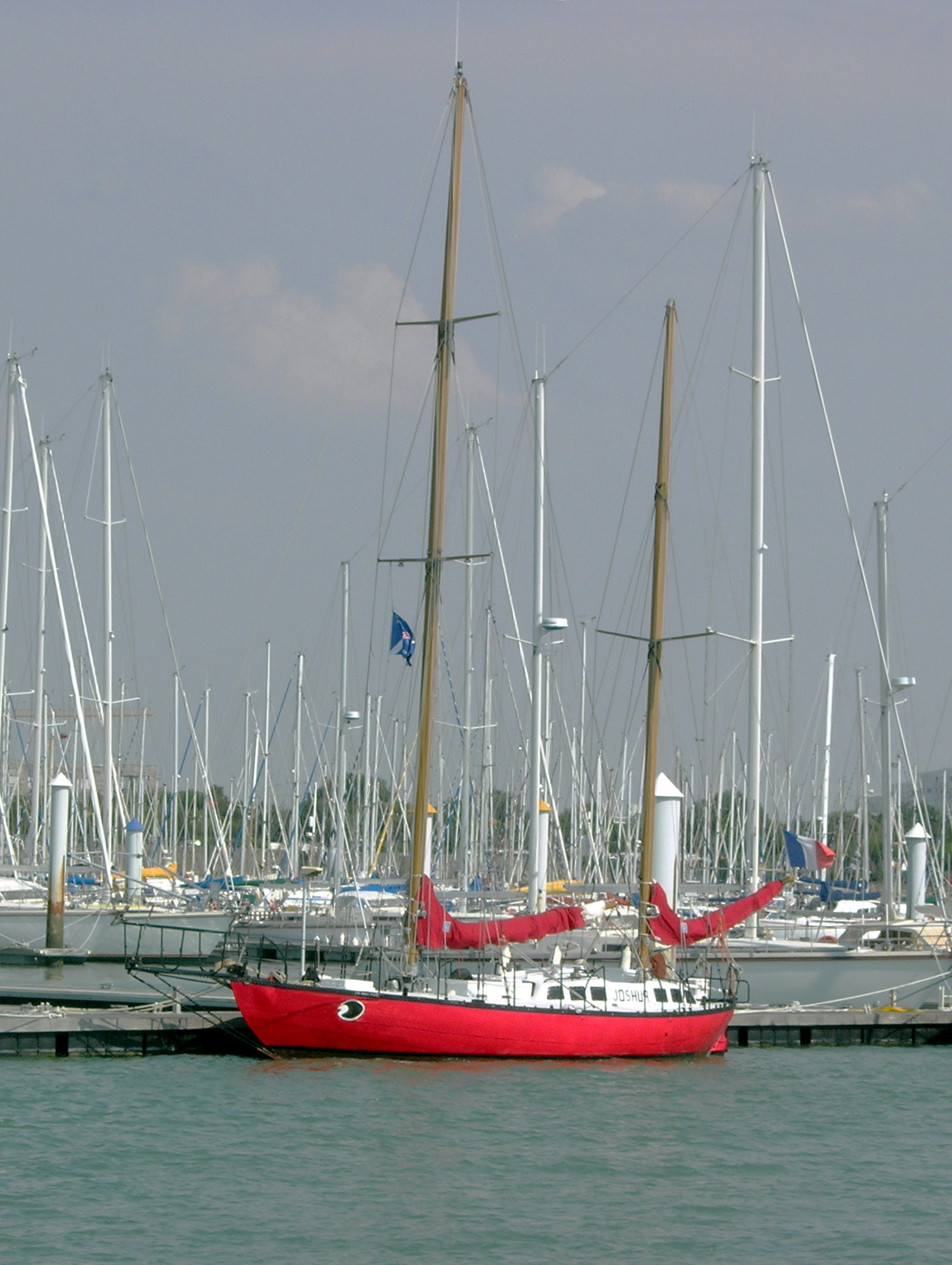 Description =Joshua le bateau de Moitessier au Minimes a la Rochelle Source =Photo taken by Remi Jouan Date =Aout 2006 Author =Remi Jouan